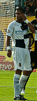 Partido del 13 de marzo de 2013 por el Campeonato de Primera B Nacional, Rosario Central 2-Olimpo de Bahía Blanca 2 en el Estadio Gigante de Arroyito. Jesús Méndez de Rosario Central.